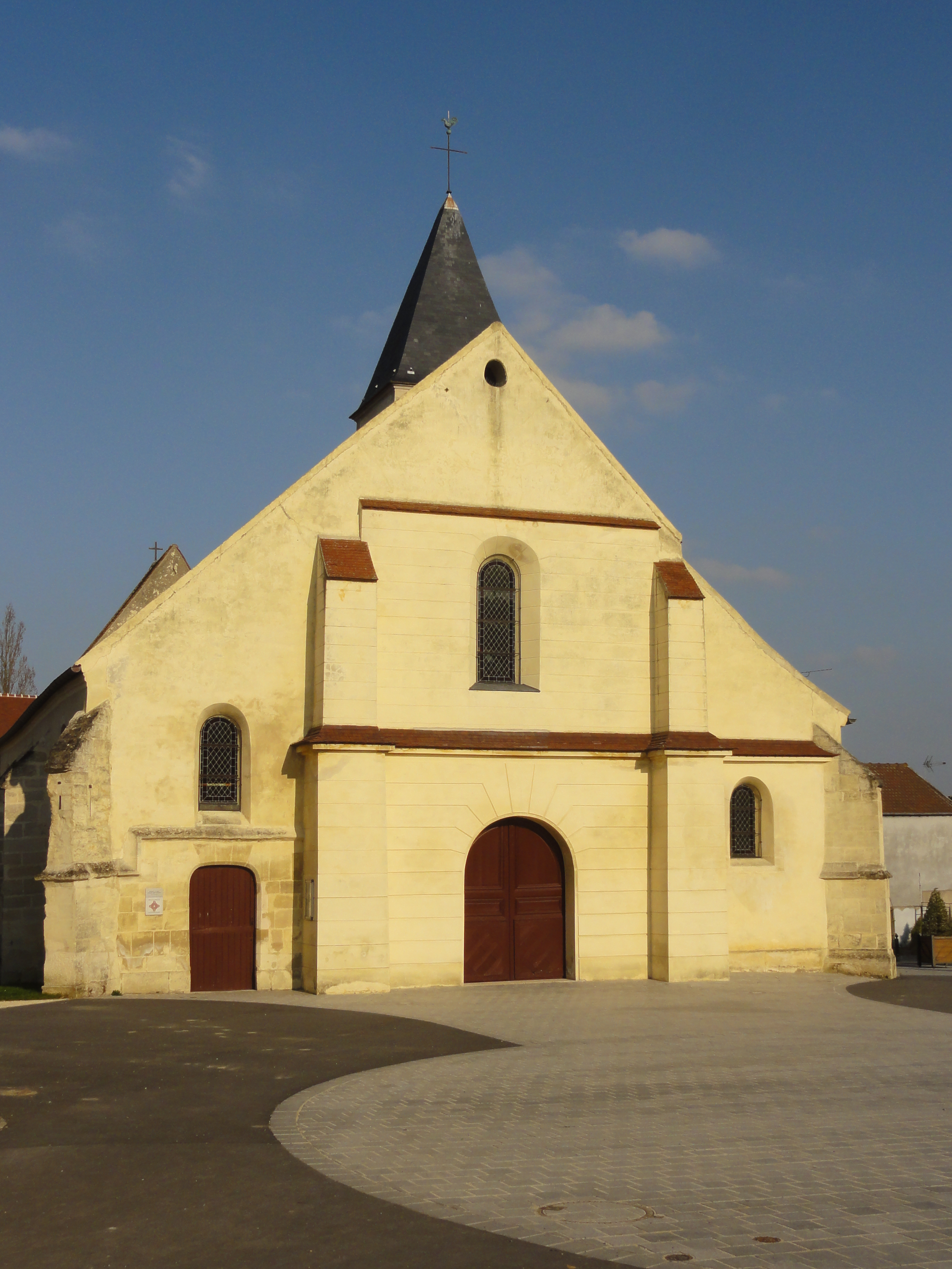 Église Saint-Vincent de Moussy-le-Neuf (voir titre).